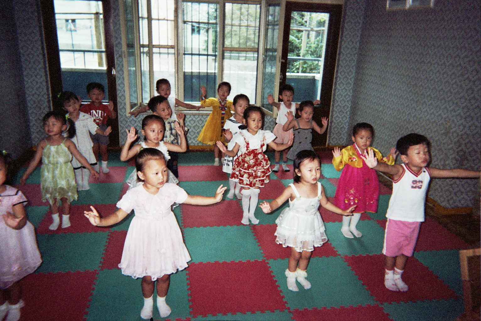 Children performing at Kindergarten, Pyongyang